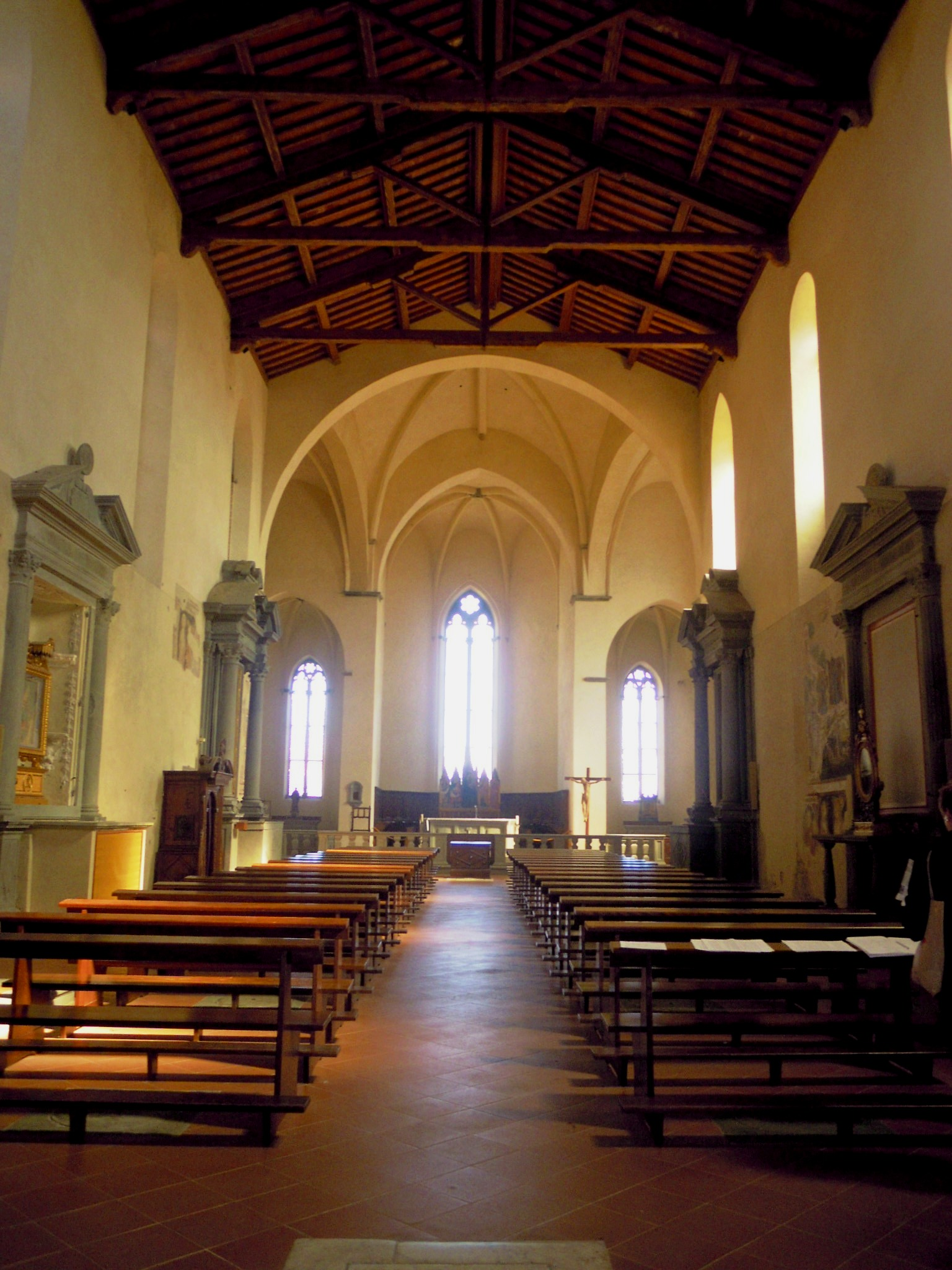 Chiesa e complesso di San Francesco This is a photo of a monument which is part of cultural heritage of Italy.